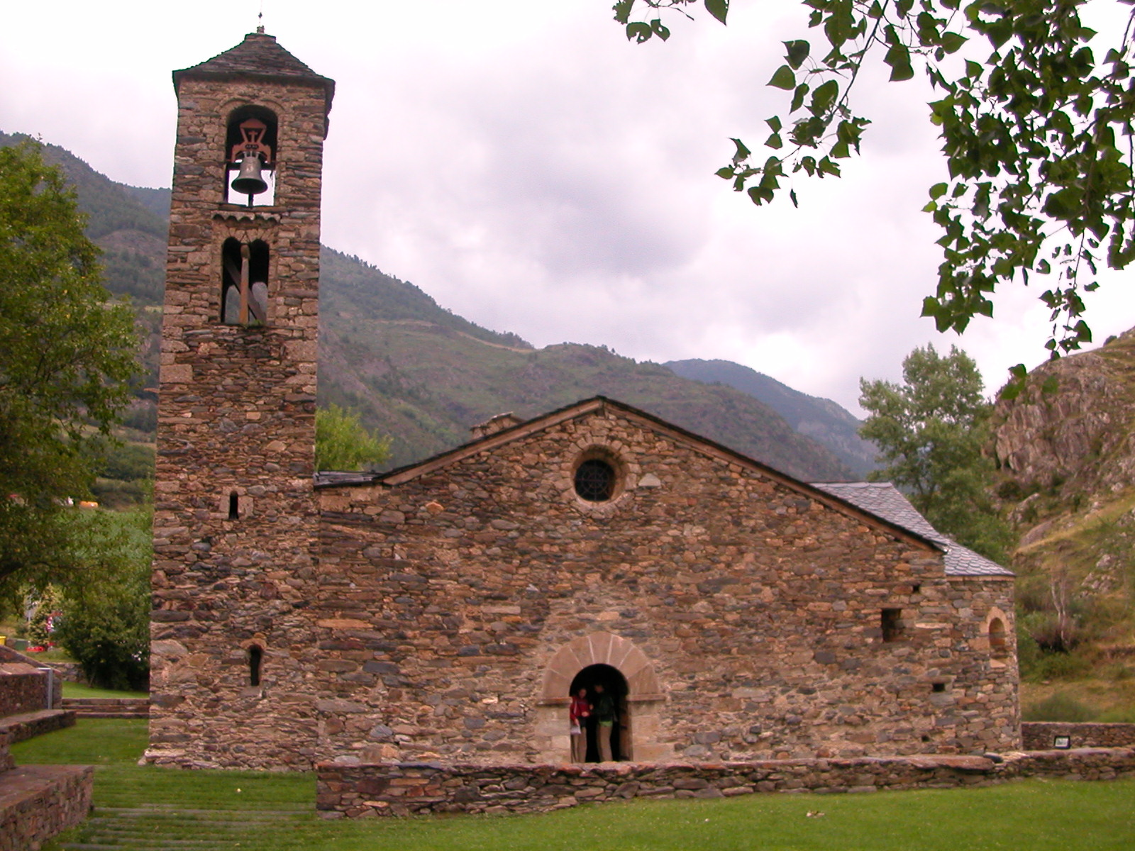 Sant Martí de la Cortinada, a 12th-century Romanesque church in La Cortinada, Ordino, Andorra